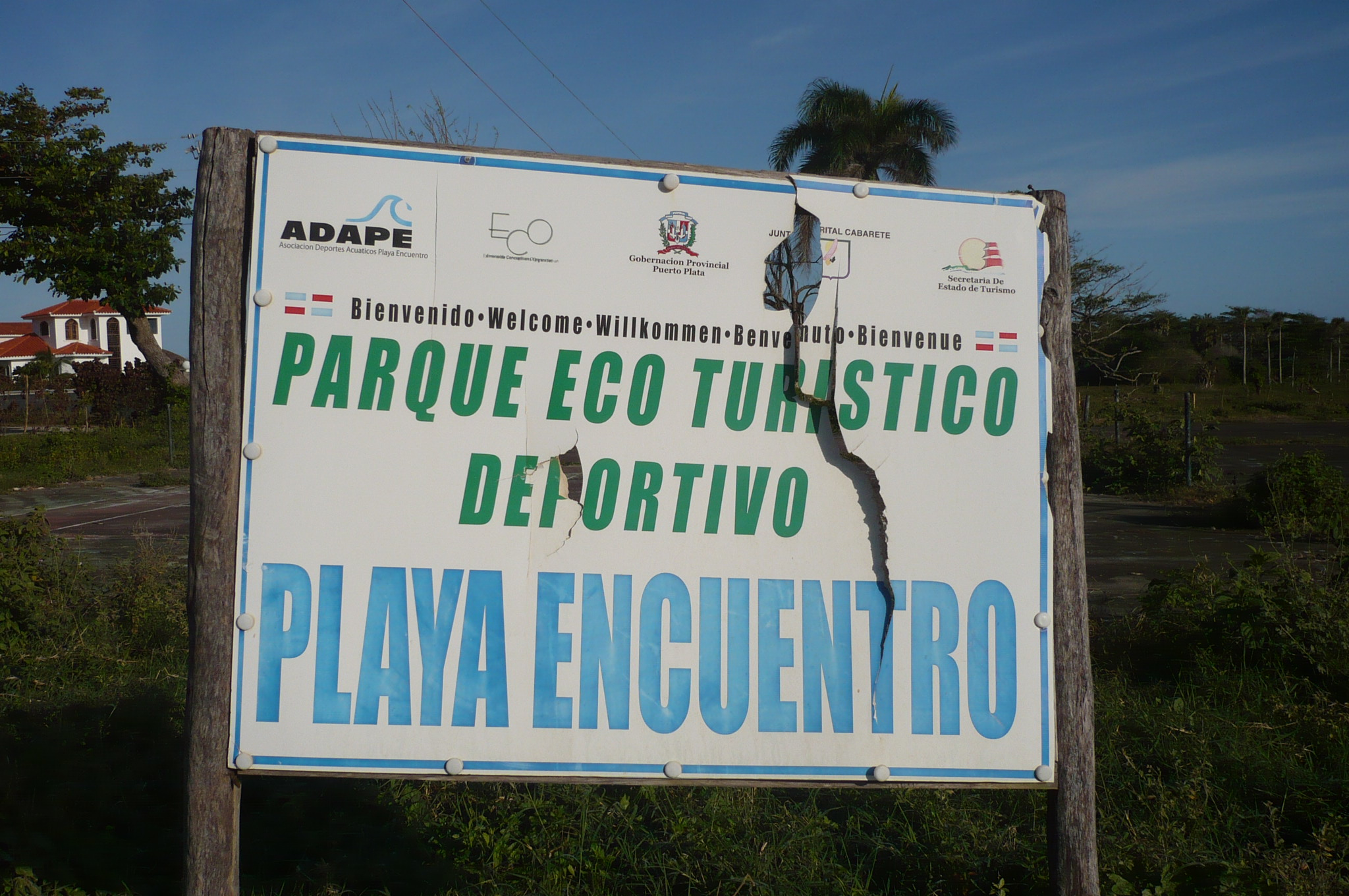 Encuentro Eingangsschild/Begrüßungsschild